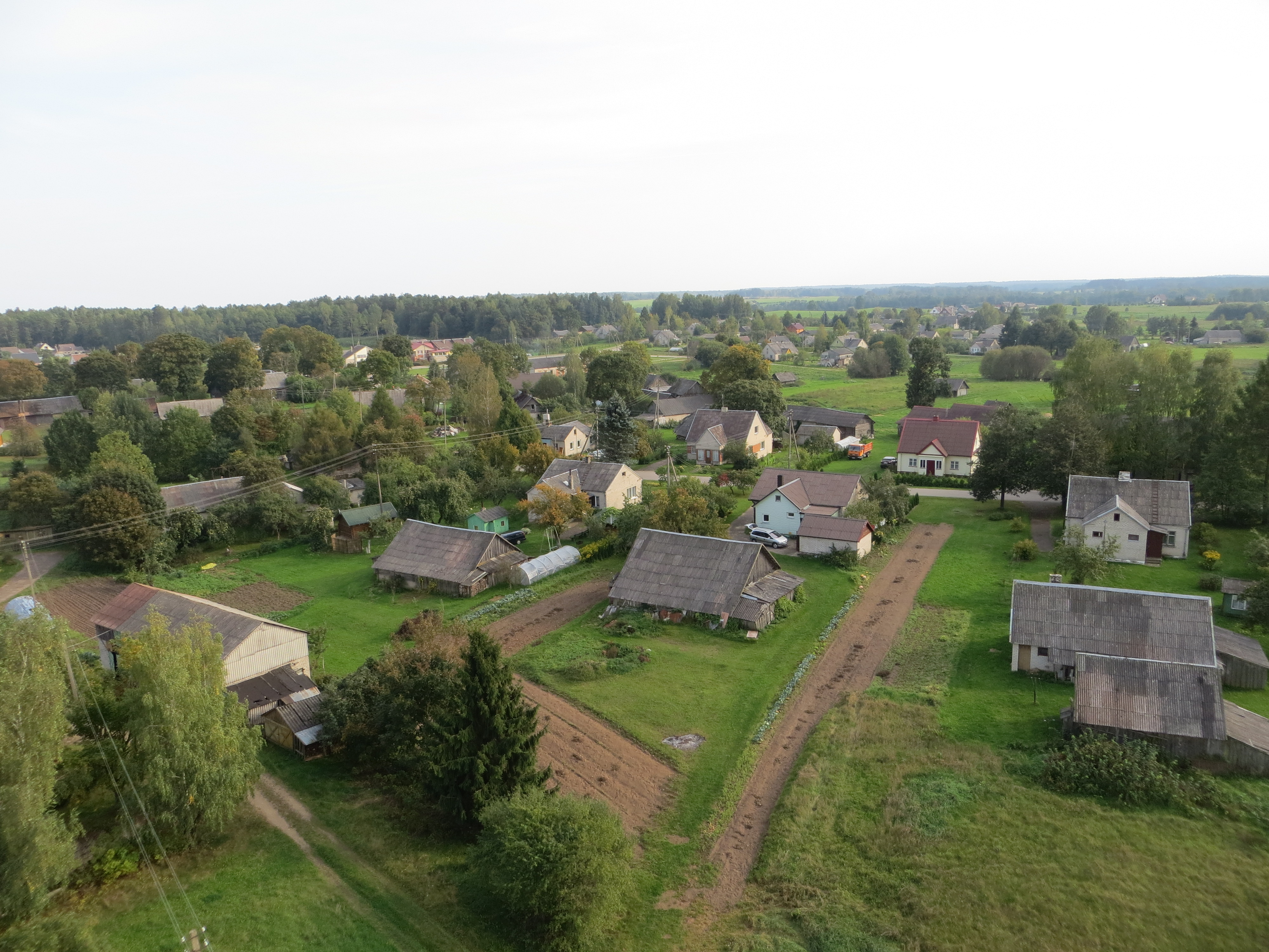 Toliejai, Lithuania